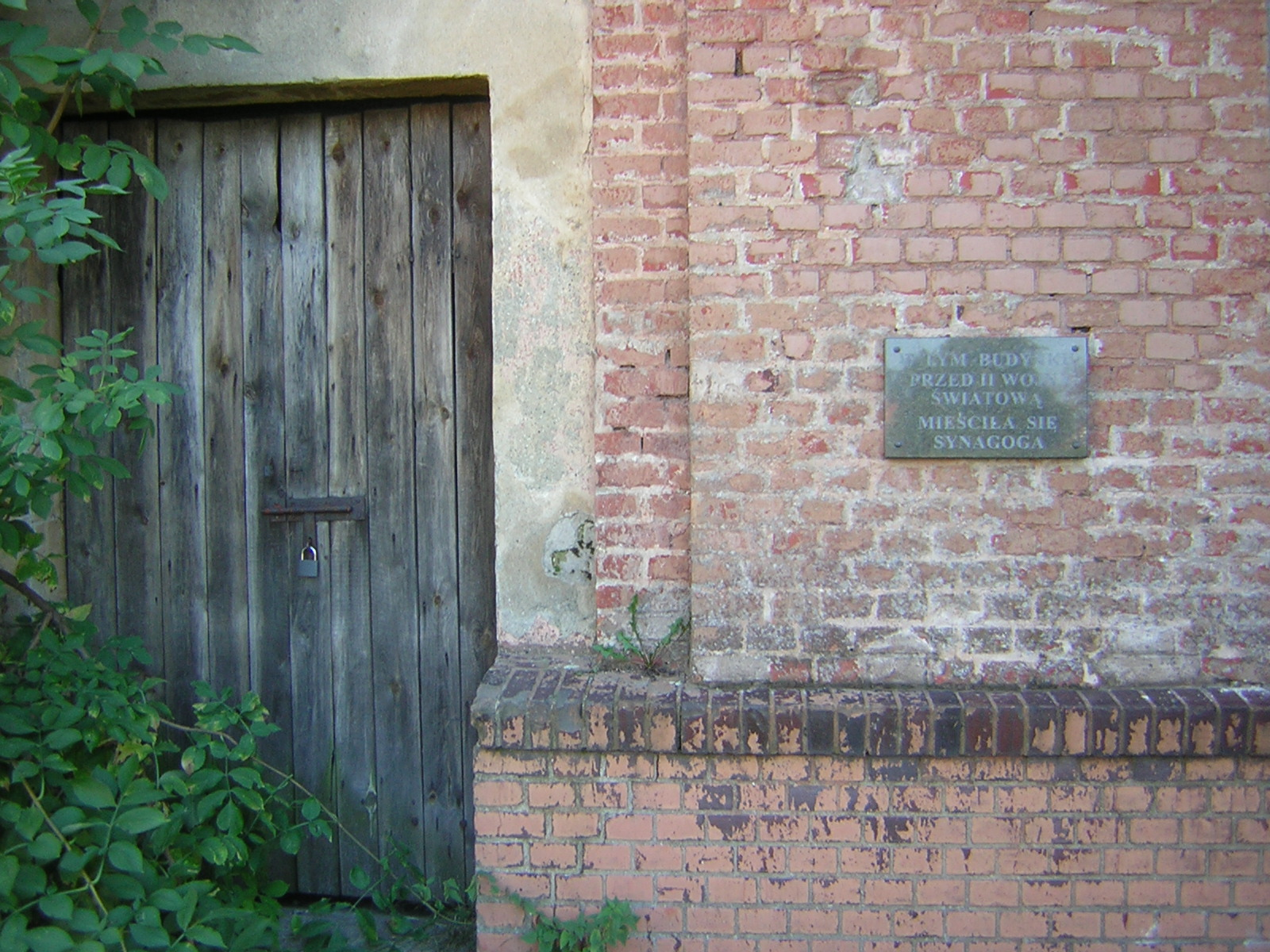 Synagoga w Dąbrównie